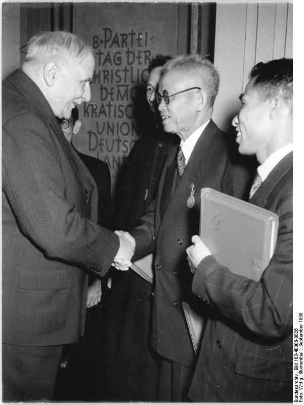 Zentralbild Bez. Red. Eft. Wittig-Blumenthal. 8. Parteitag der Christlich-Demokratischen Union vom 12. - 15. September 1956 in Weimar. In der Zeit vom 12. - 15. September 1956 findet in der Weimarhalle zu Weimar der 8. Parteitag der Christlich-Demokratischen Union statt. Die ca. 1000 Delegierten zählen 50 westdeutsche Friedensfreunde und Vertreter von 15 Nationen zu ihren Gästen. UBz.: Oberbürgermeister Dr. Wiedemann (l.) von Weimar begrüsst in der Mittagspause die Gäste aus Vietnam.